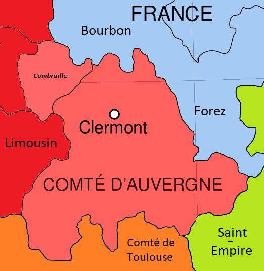 Comté d'Auvergne sous Guy II - Mariage avec Péronnelle de Chambon